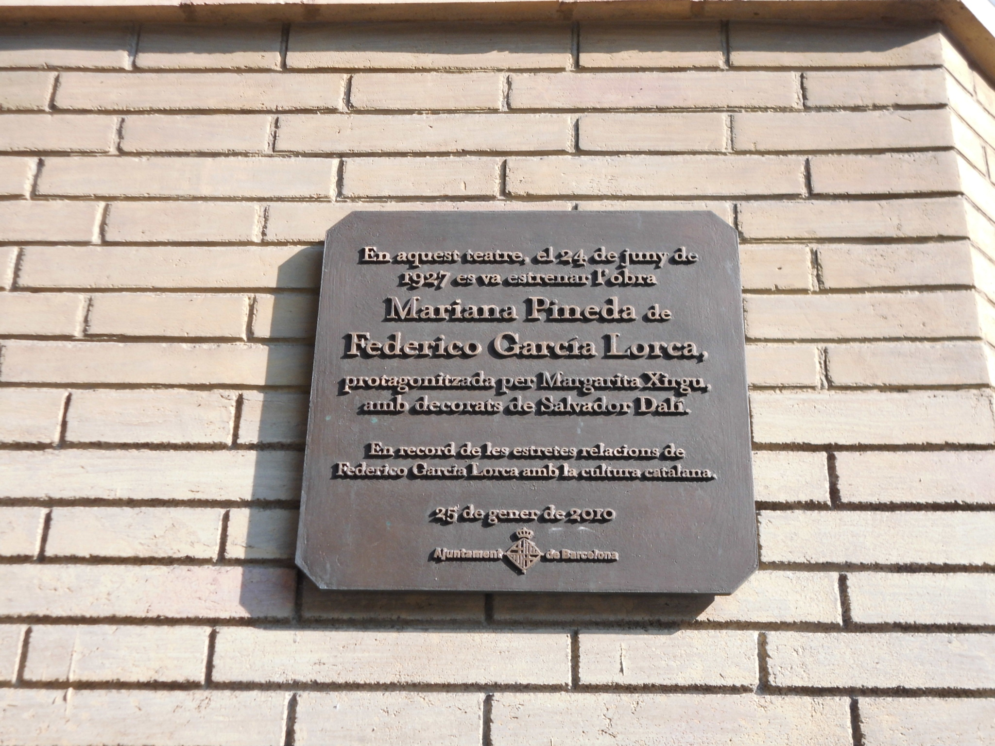 Federico García Lorca. C. Joaquim Costa, 68 -façana Teatre Goya- (Barcelona)